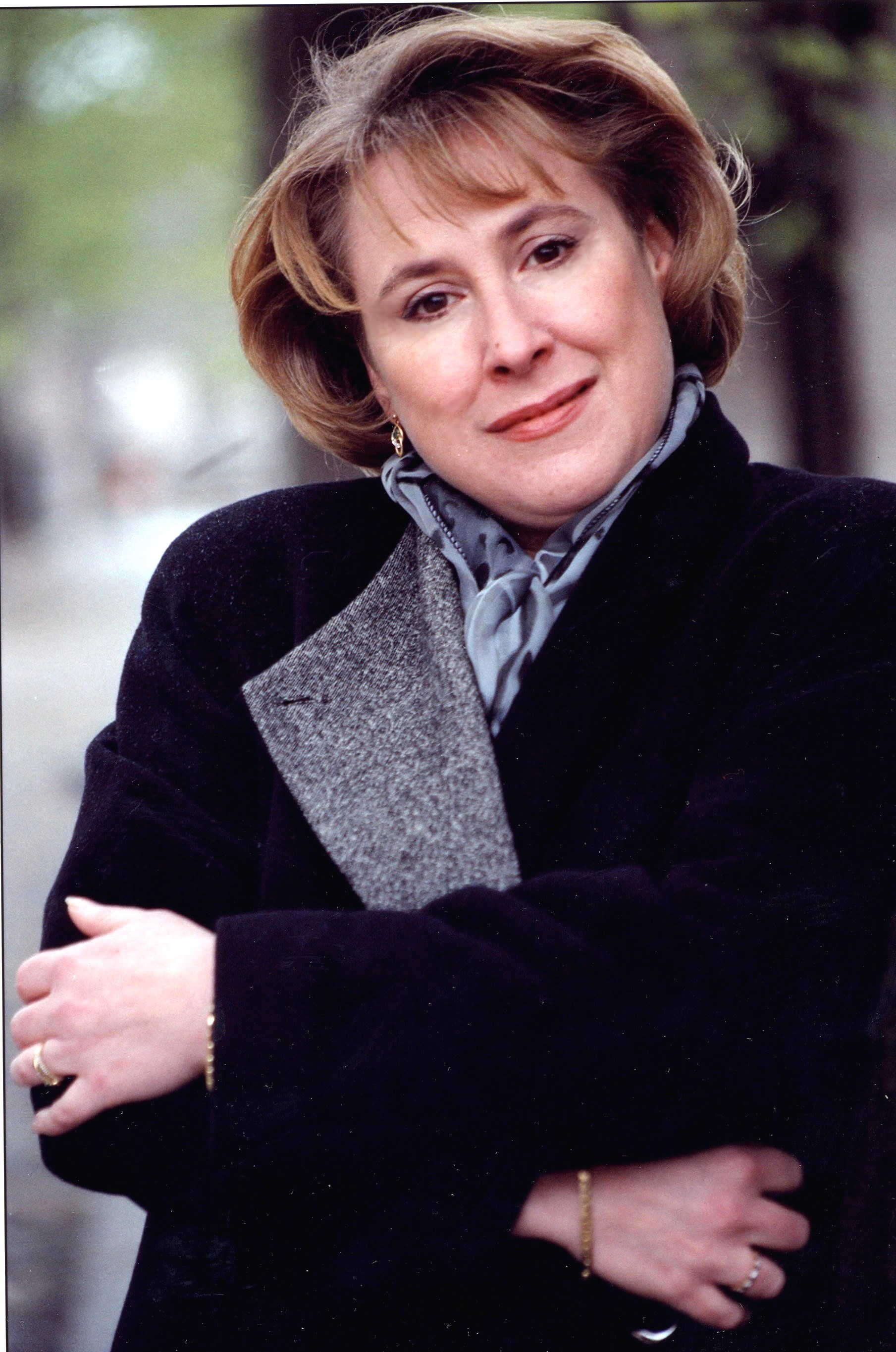 Писатель Татьяна Гармаш-Роффе